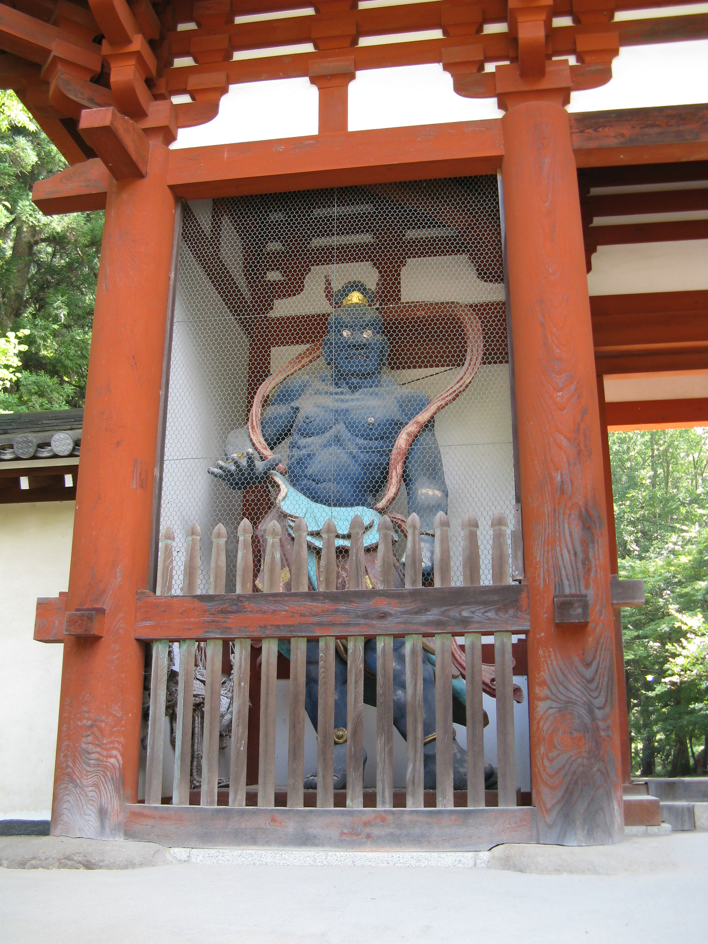 室生寺 仁王門